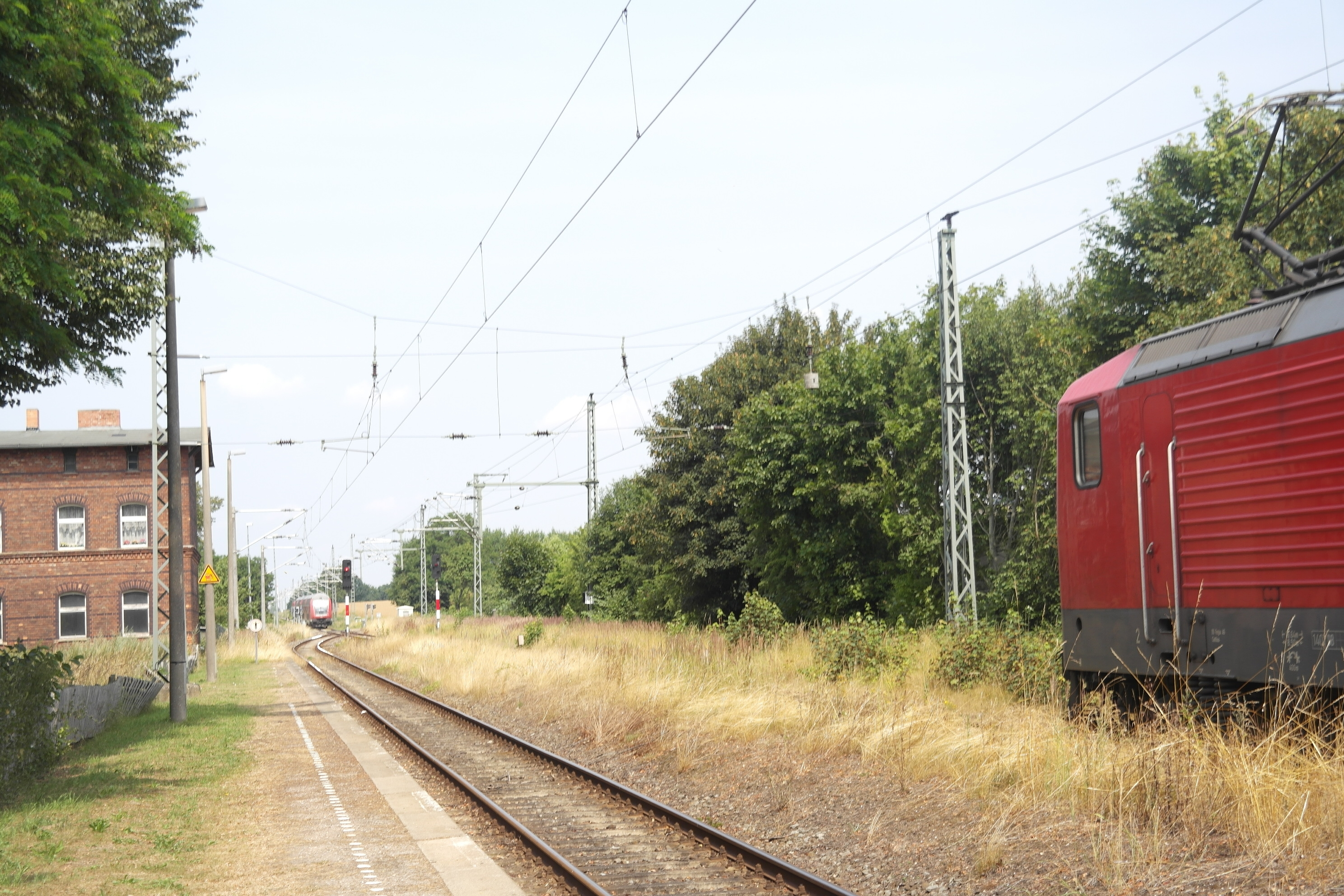 Bahnhof Sternfeld, Zugkreuzung zweier RE-Züge